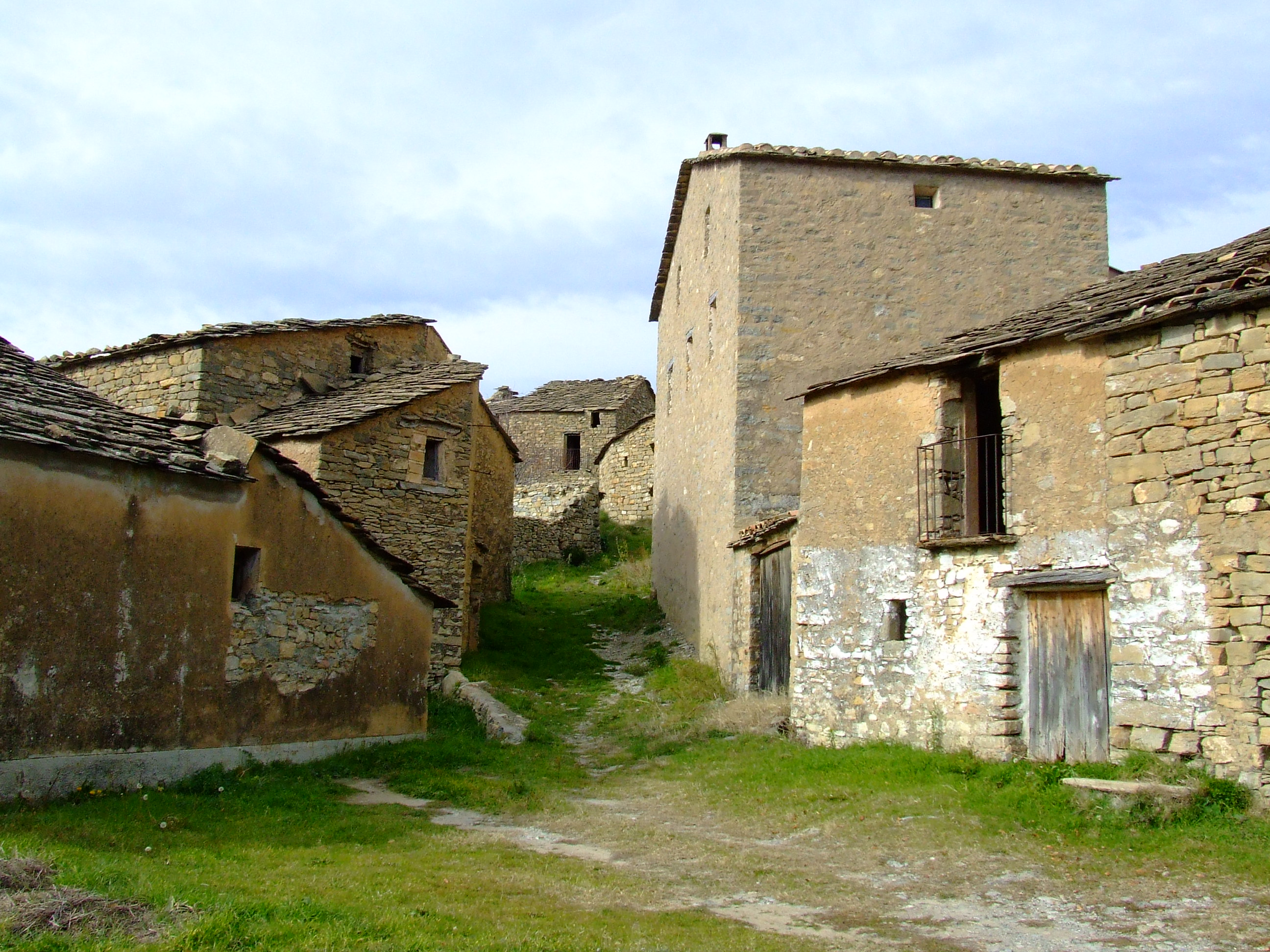 Carrer major de Siall (Isona, Isona i Conca Dellà, Pallars Jussà)